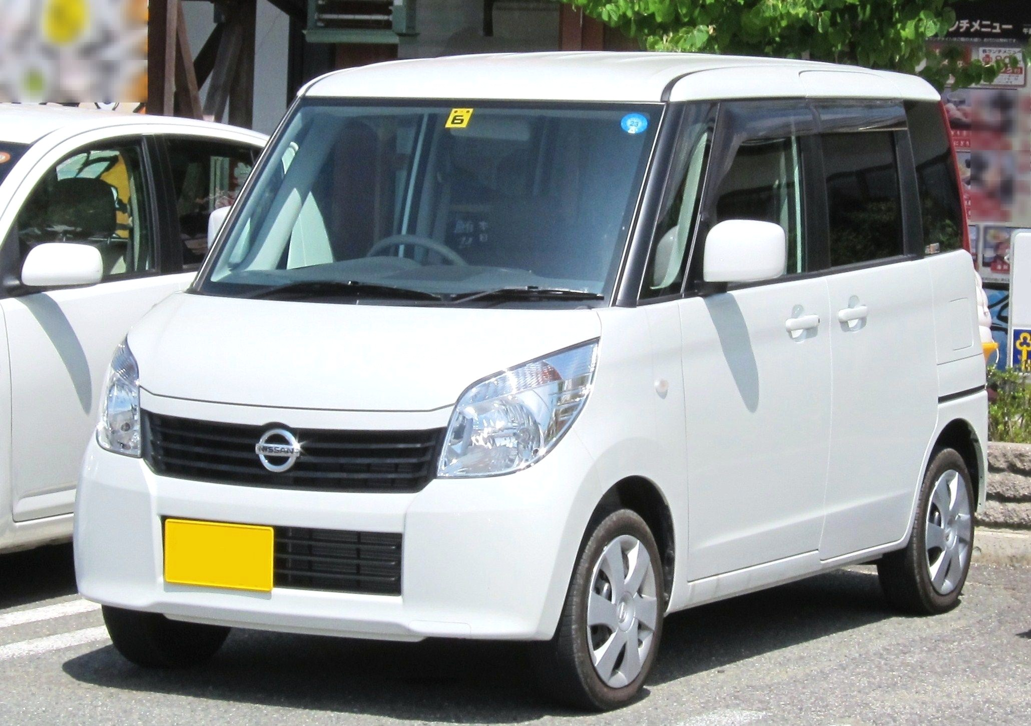 Nissan Roox